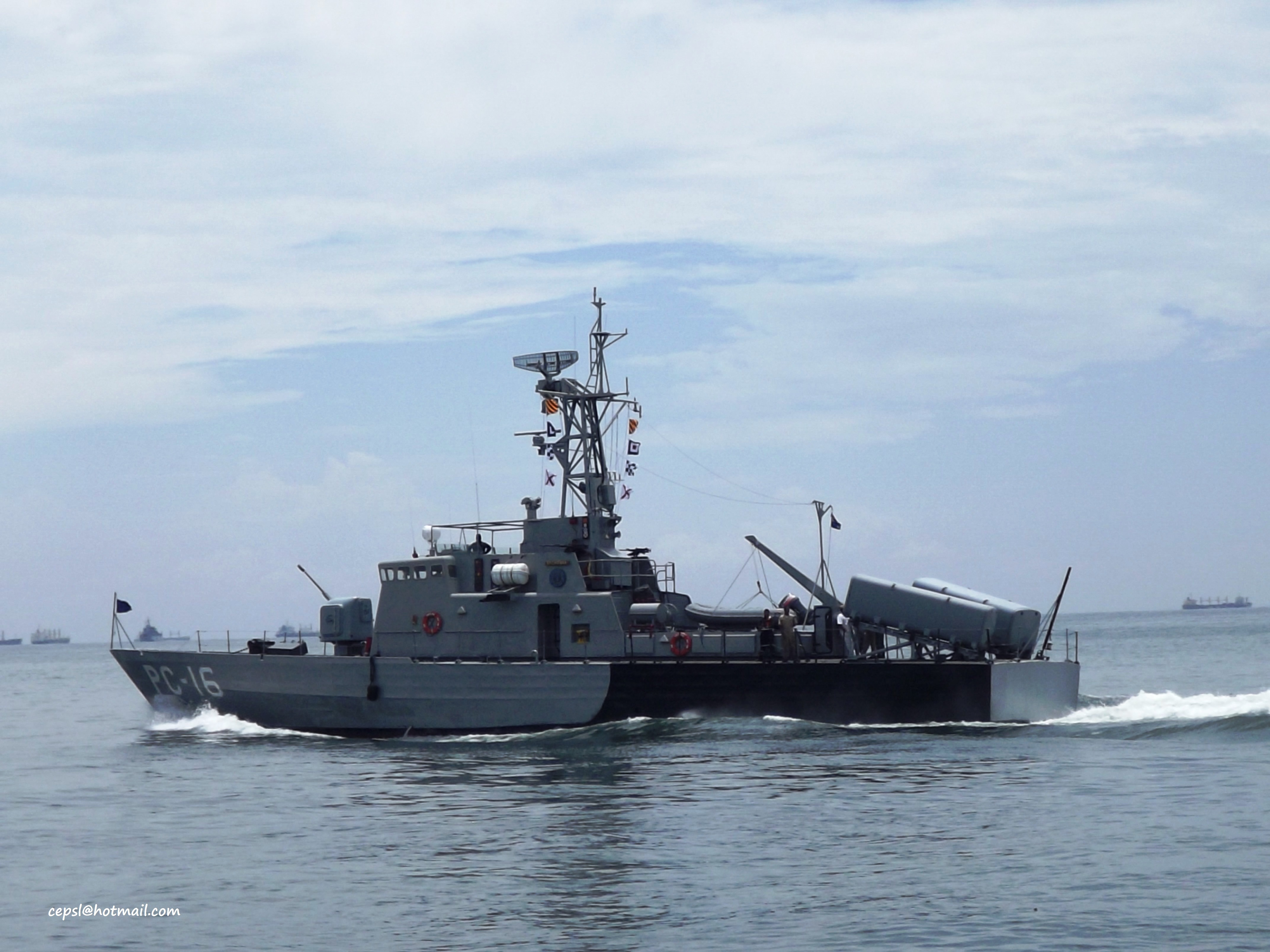 Patrullero de Combate tipo Vosper clase Federación, AB Victoria PC-16